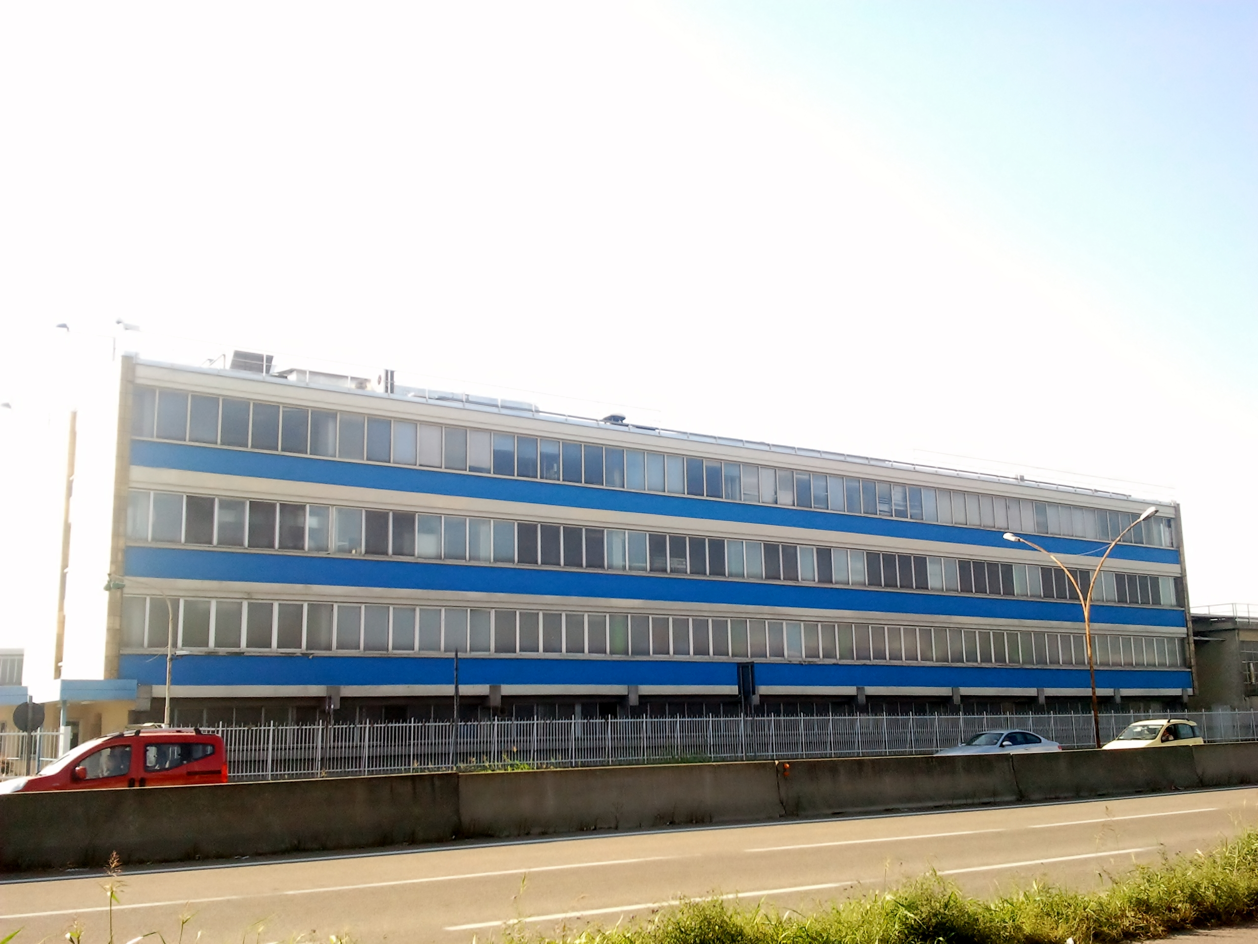 Carrozzeria Bertone. Torino. Italy